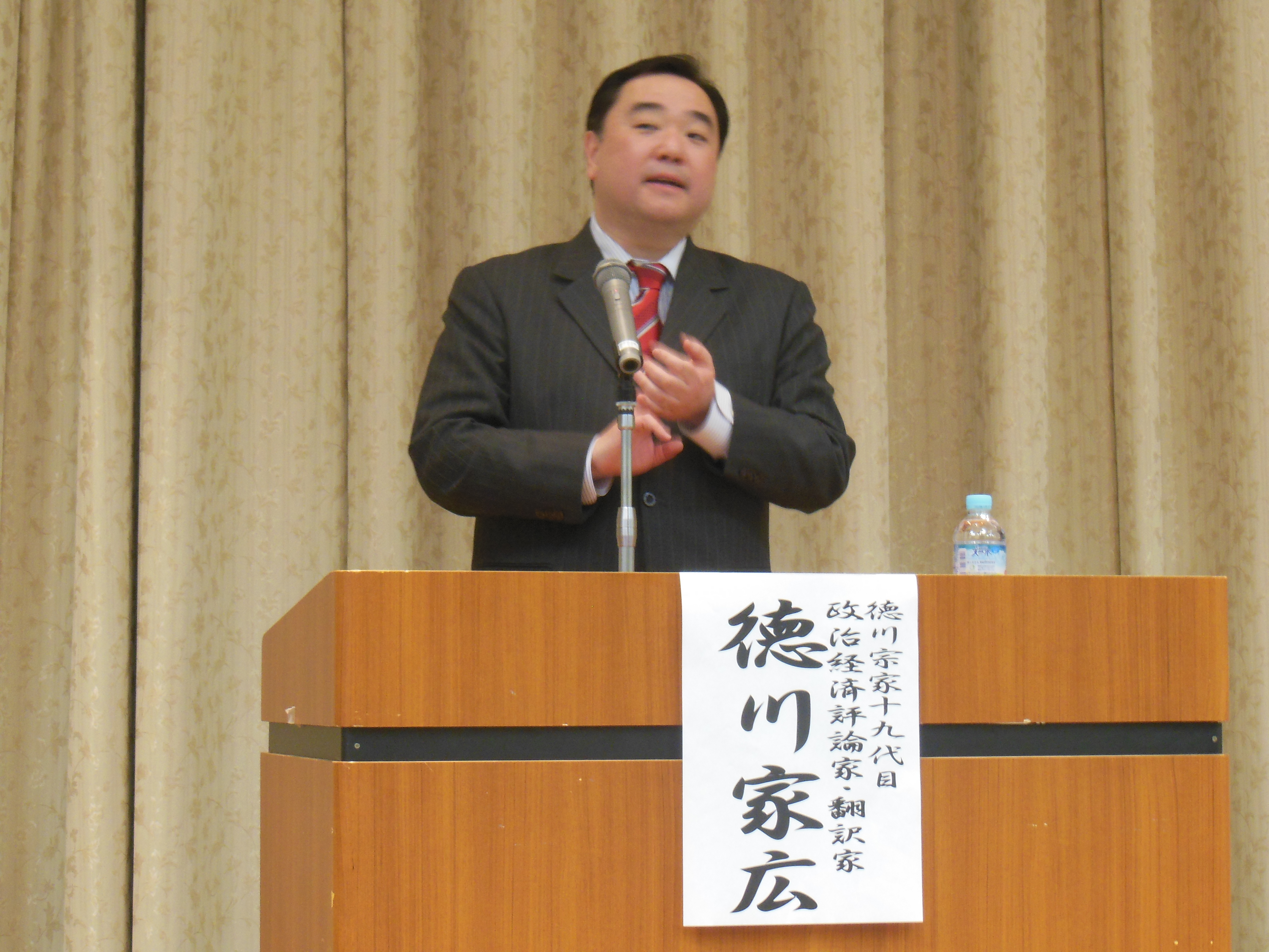 徳川宗家19代徳川家広氏 政治経済評論家 翻訳家